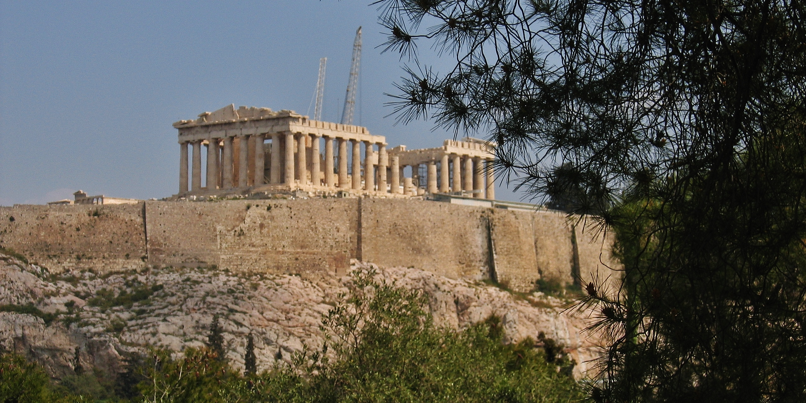 Akropolis , Ακρόπολη της Αθήνας